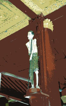 Représentation de la vieillesse découverte par le Prince Gautama, futur Bouddha (Bagan, paya Shwe Zi Gon,fondée au 11ème siècle)